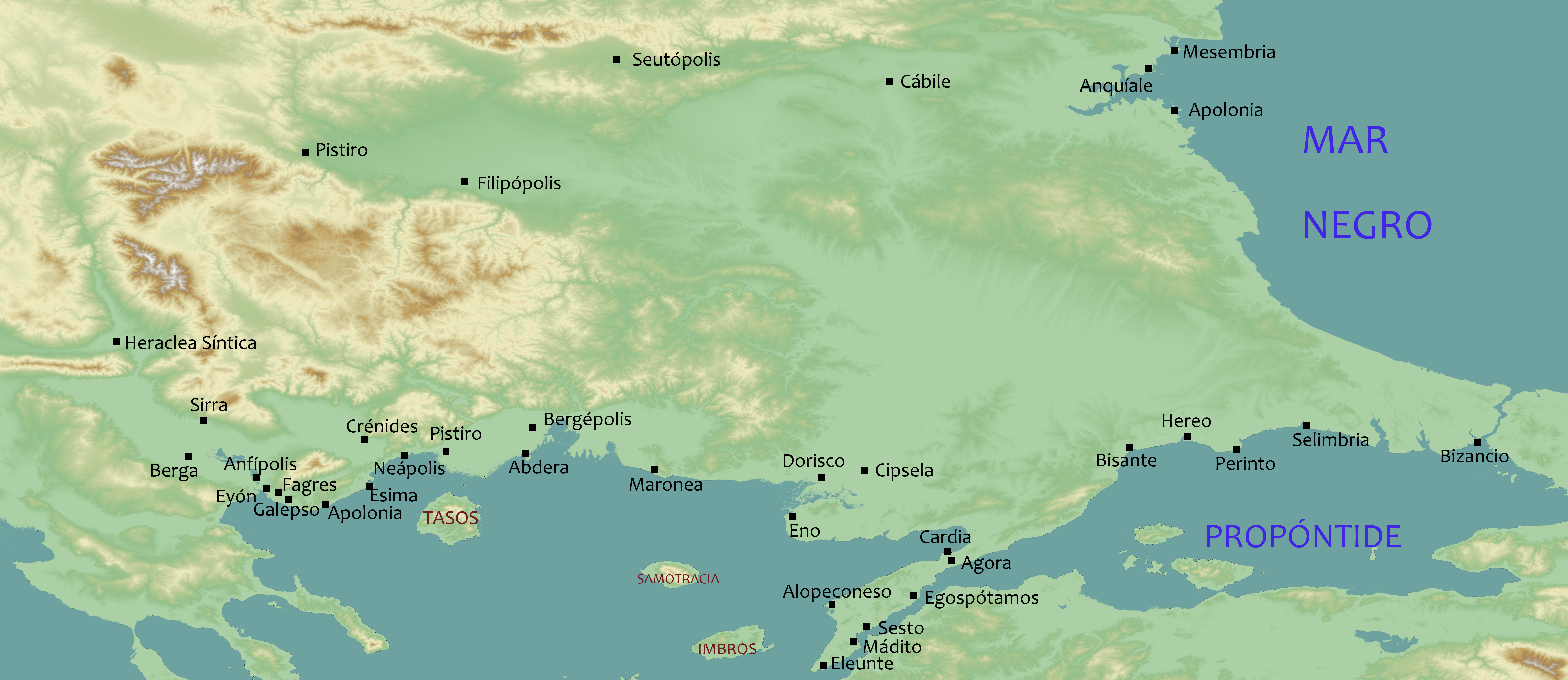 Mapa con la ubicación de algunas de las colonias griegas en la antigua Tracia.